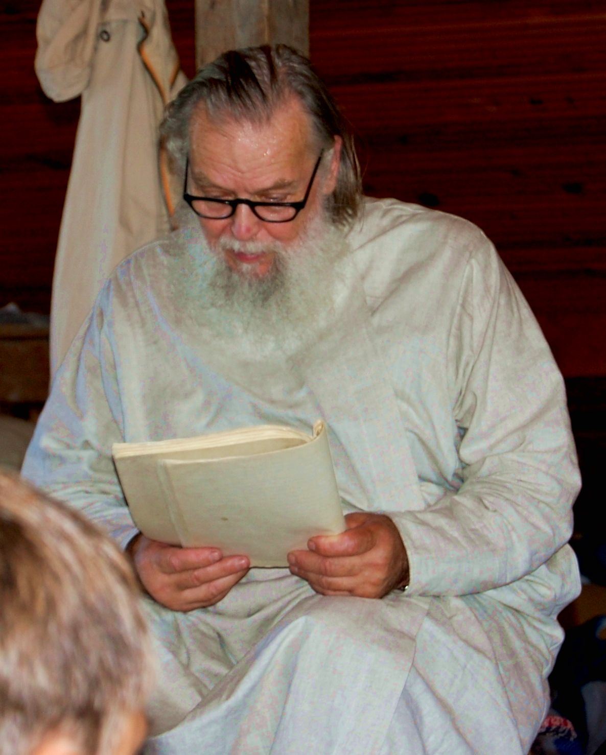 отец Павел Адельгейм, Псков